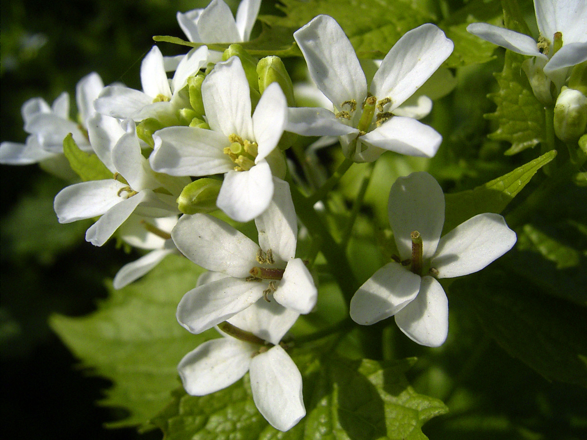 gouda, eigen foto, hiermee onder gnu/fdl gebracht